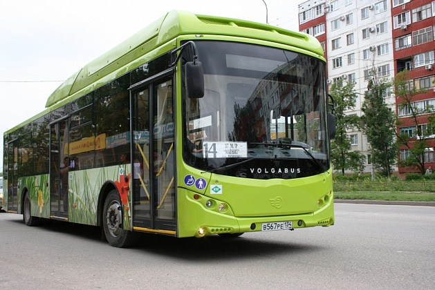 Автобус Volgabus-5270.G2 в светло-зелёном окрасе на маршруте № 14 в Волгограде